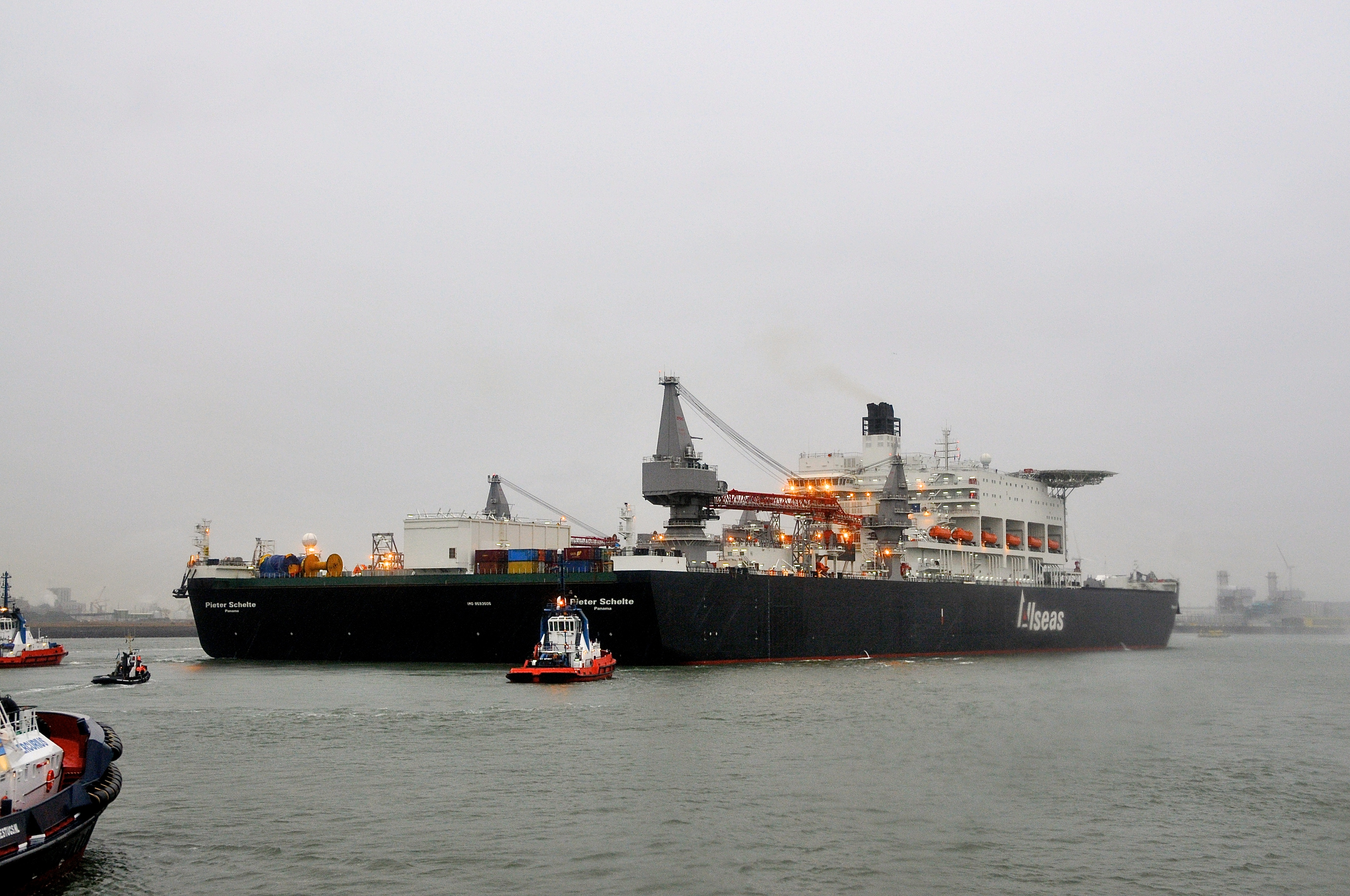 Op donderdag 8 januari 2014 kwam de Pieter Schelte voor het eerst in de haven van Rotterdam aan. Het in Zuid Korea gebouwde schip zal enkele maanden in de 2e Maasvlakte blijven liggen om afgebouwd te worden. Het schip is 382m lang en 124m breed. Het heeft een bemanning van 570 man. De komst van het schip is omstreden, het is genoemd naar een Nazi, er zijn zelfs kamervragen over gesteld. Lees ook